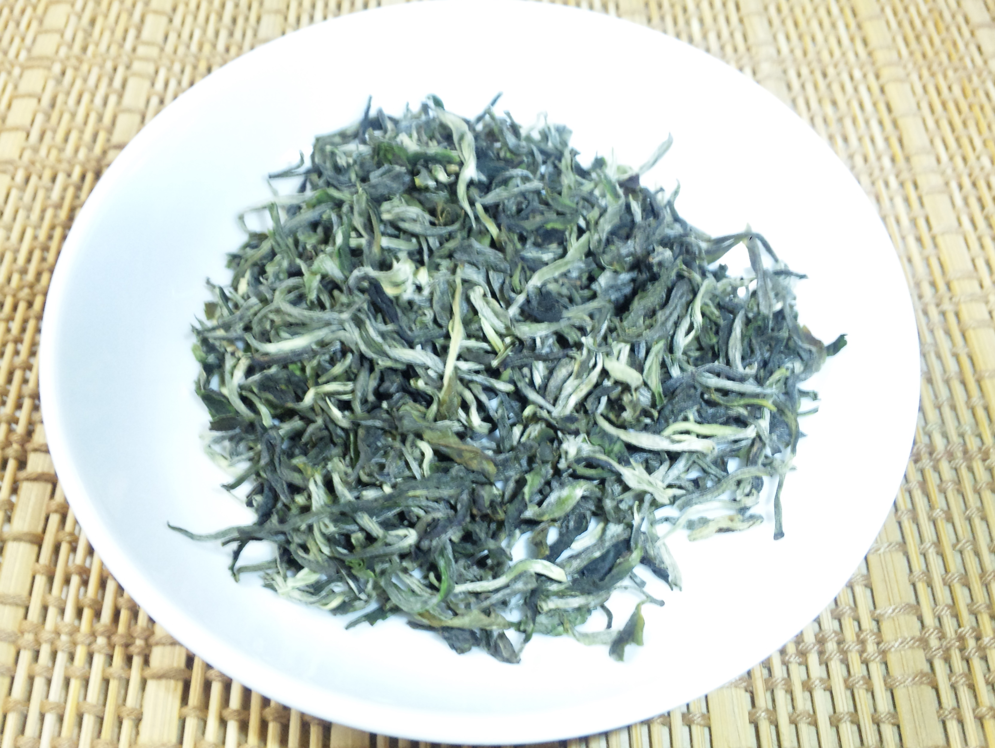 プーアル散茶（生茶）